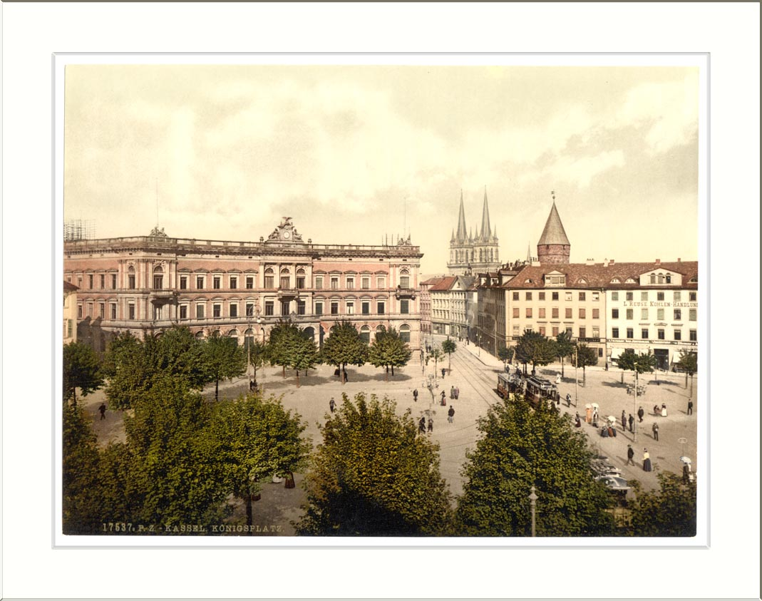 Konigsplatz Cassel (i.e. Kassel) Hesse-Nassau Germany